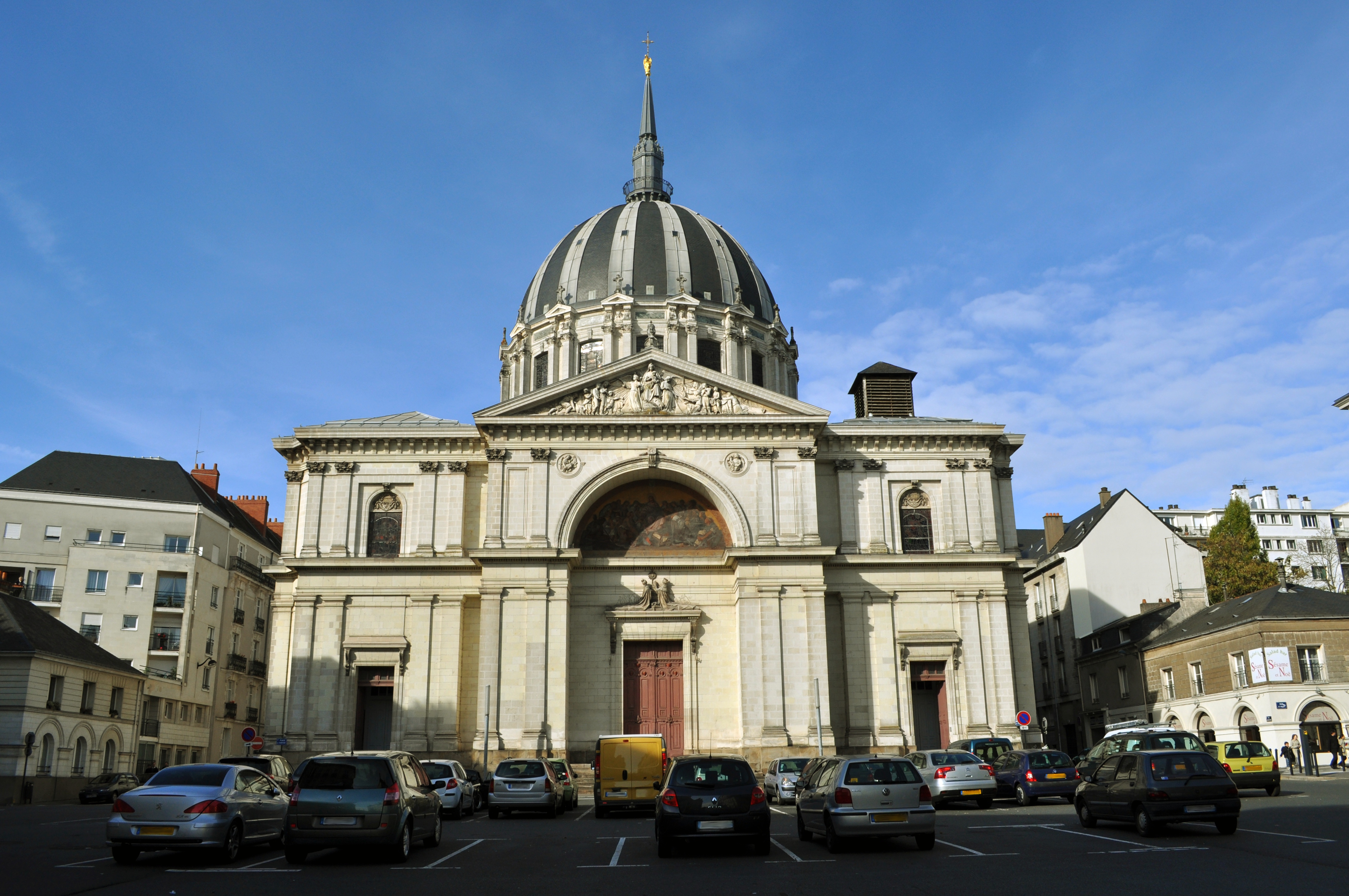 Iliz Notre-Dame de Bon-Port e Naoned.